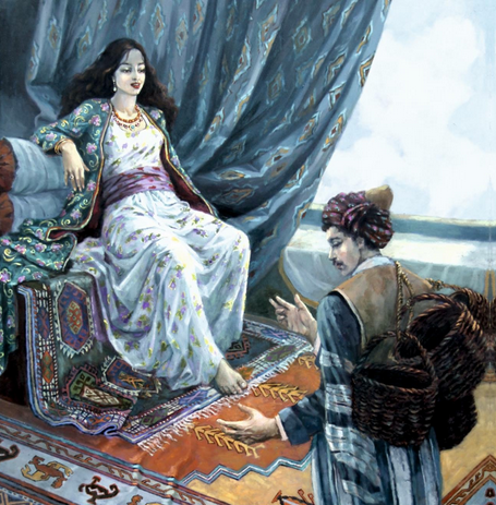 Zembîlfiroş û Xatûna Mîr